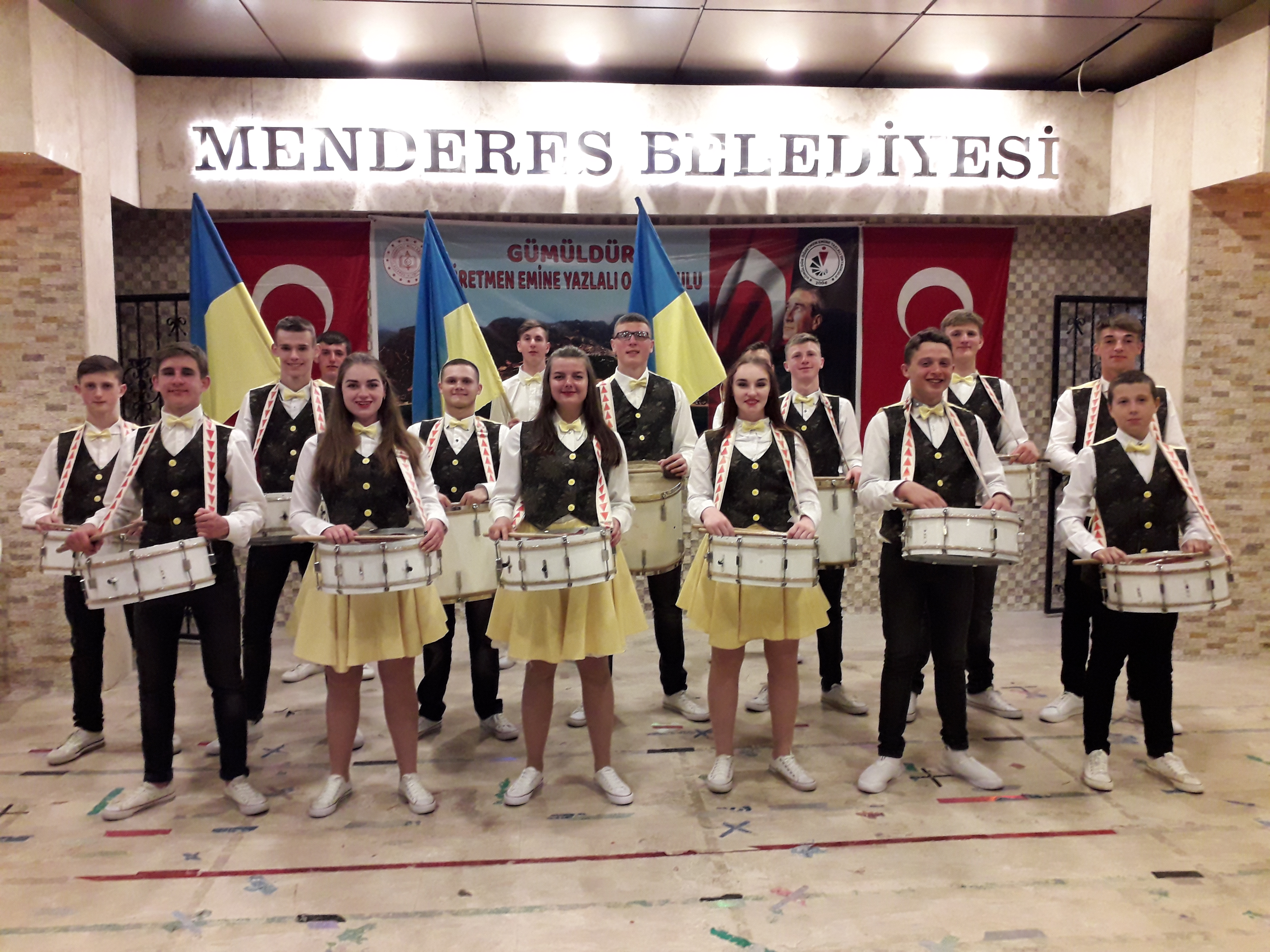 Ансамбль барабанщиків «Запальні ритми» (« Fire rhythms») на Міжнародному фестивалі “Mandarin Flower” 2019, Оздере (Ізмір) – Туреччина